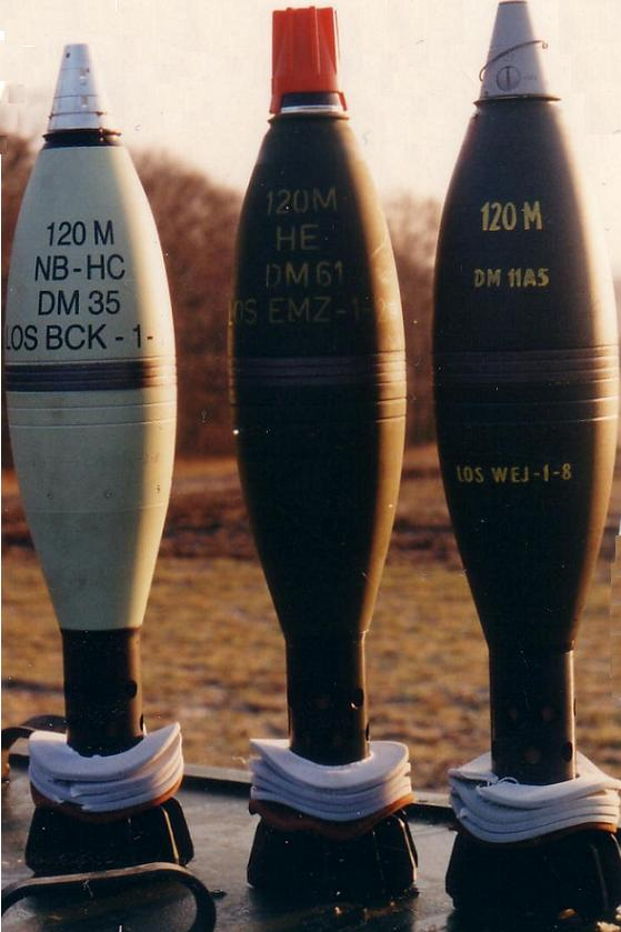 Mörserpatronen 120mm für den Mörser Tampella v.l.n.r: Nebel, Sprengpatrone (HE) mit Annäherungszünder, Sprengpatrone (HE) mit Aufschlagszünder. Am unteren Teil erkennt man die Treibladung aus Zellulosenitrat (NC):Braun Grundladung (bleibt immer drauf)weiß Teilladungsringe. Diese werden je nach Entfernung abgezogen. Die maximale Ladung sind 8 weiße Teilladungen. Zugelassen ist der Tampellamörser bis 12.